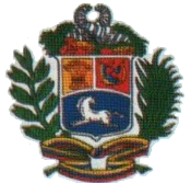 Decreto de Cipriano Castro del 28 de marzo de 1905. El Escudo de Armas de los Estados Unidos de Venezuela llevará en su campo los colores del Pabellón Nacional, en tres cuarteles: el de la derecha será amarillo, y en él se colocará un manojo de mieses, que tendrá siete espigas; el de la izquierda será rojo, y como emblema del triunfo, llevará armas y dos pabellones nacionales enlazados con una corona de laureles; el tercer cuartel, que ocupará toda la parte inferior, será azul y contendrá un caballo indómito, blanco símbolo de la Independencia y libertad. El Escudo tendrá por timbre el emblema de la abundancia, y en la parte inferior una rama de olivo y una palma, atada con cintas que deben tener los colores nacionales y llevará en letras de oro las inscripciones siguientes: en el centro del Escudo, «Dios y Federación»; a la derecha de éste, «5 de julio de 1811 - Independencia», y a la izquierda, «24 de marzo de 1854 - Libertad».